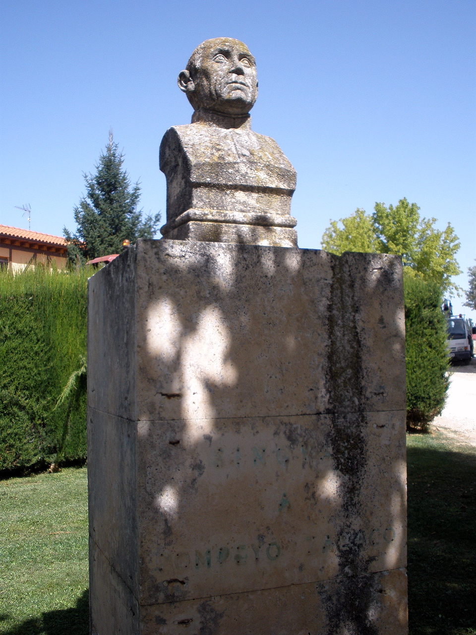 Sinovas (Aranda de Duero)